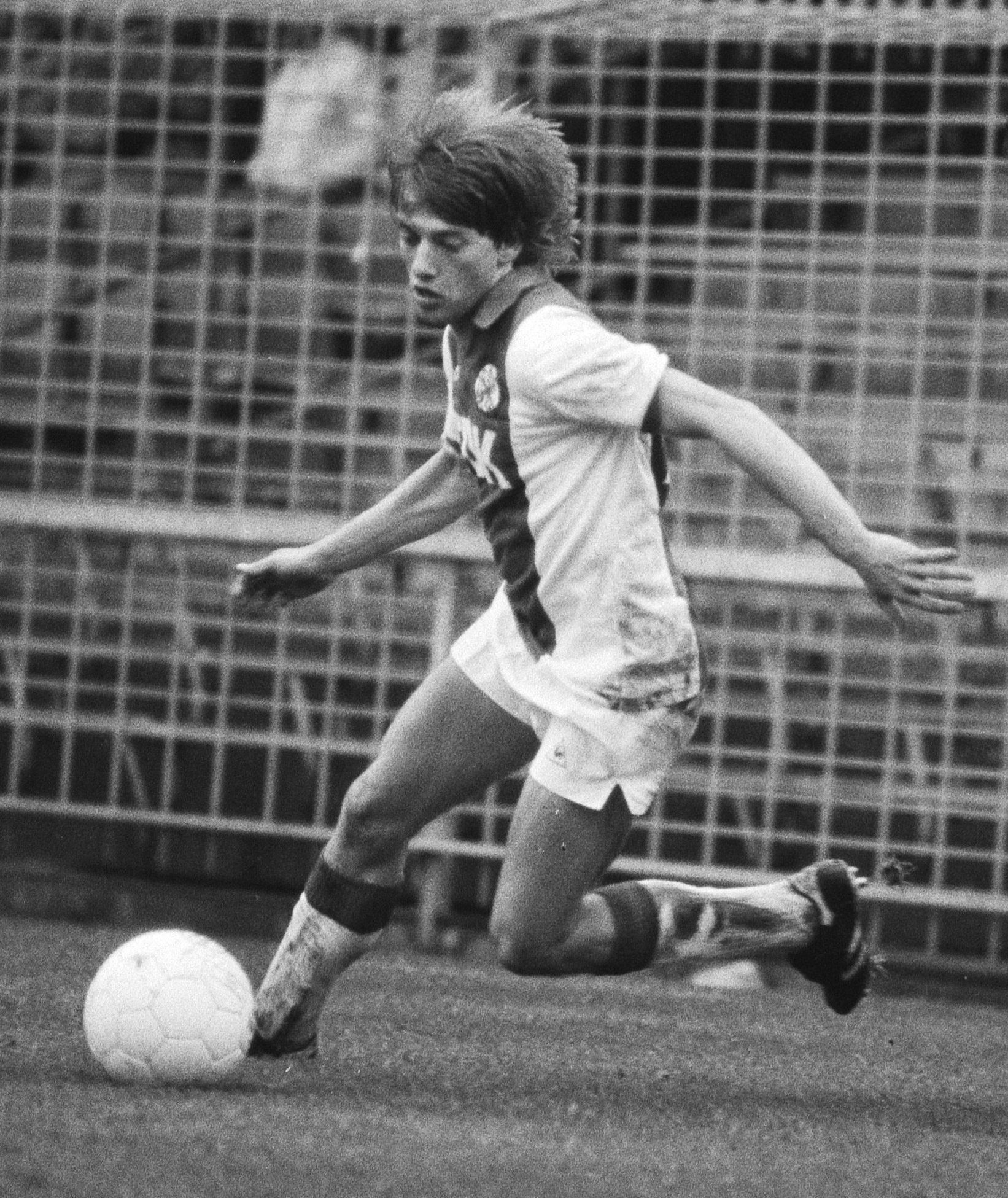 L'ajacide Jesper Olsen (à gauche) dribble Peter van de Ven. Photographie par Rob Bogaerts / Anefo.